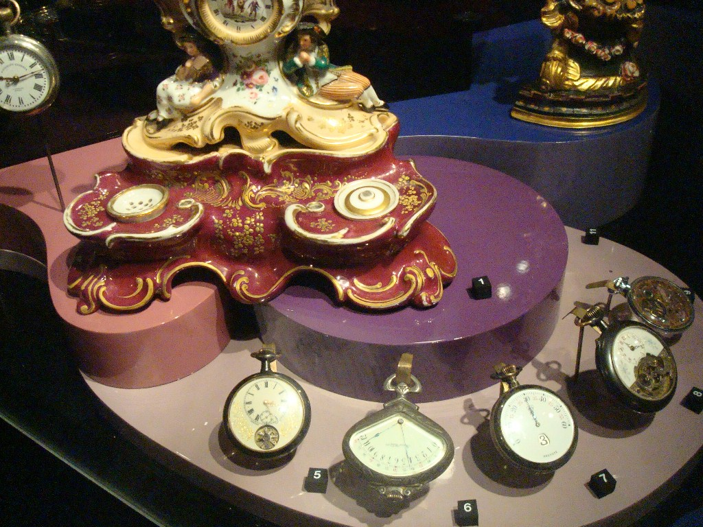 Villers-le-lac, Doubs, musée de l'horloge, série de montres à gousset d'une certaine époque